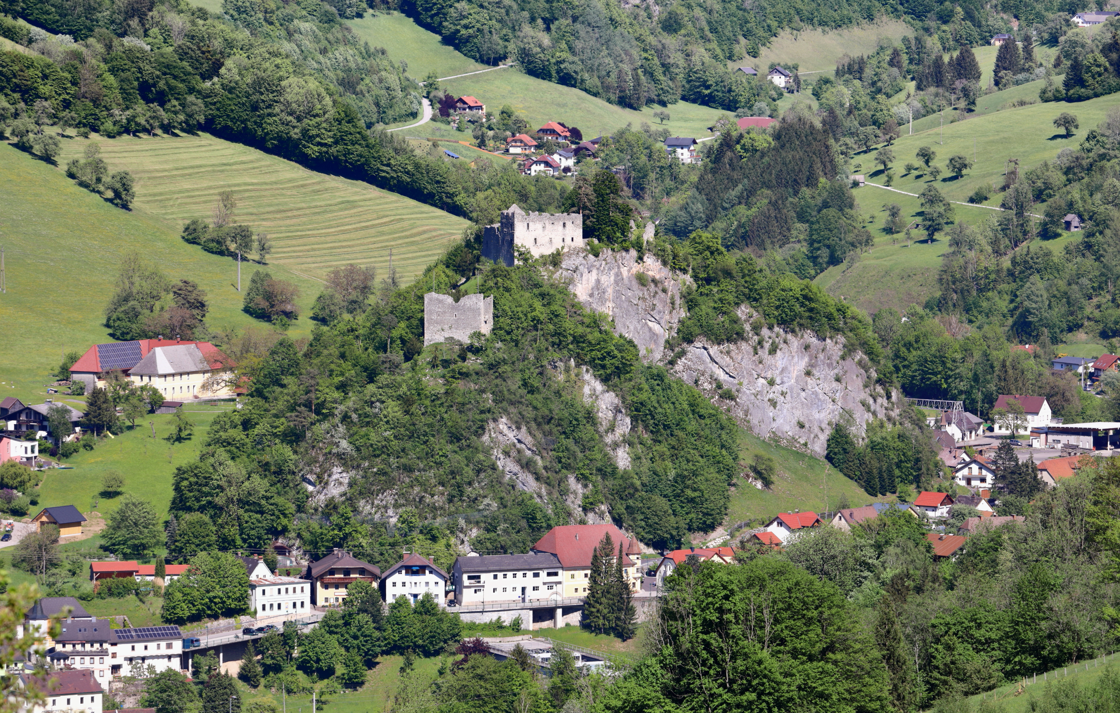 Blick von Westen auf die Burgruine in der oberösterreichischen Gemeinde Losenstein.